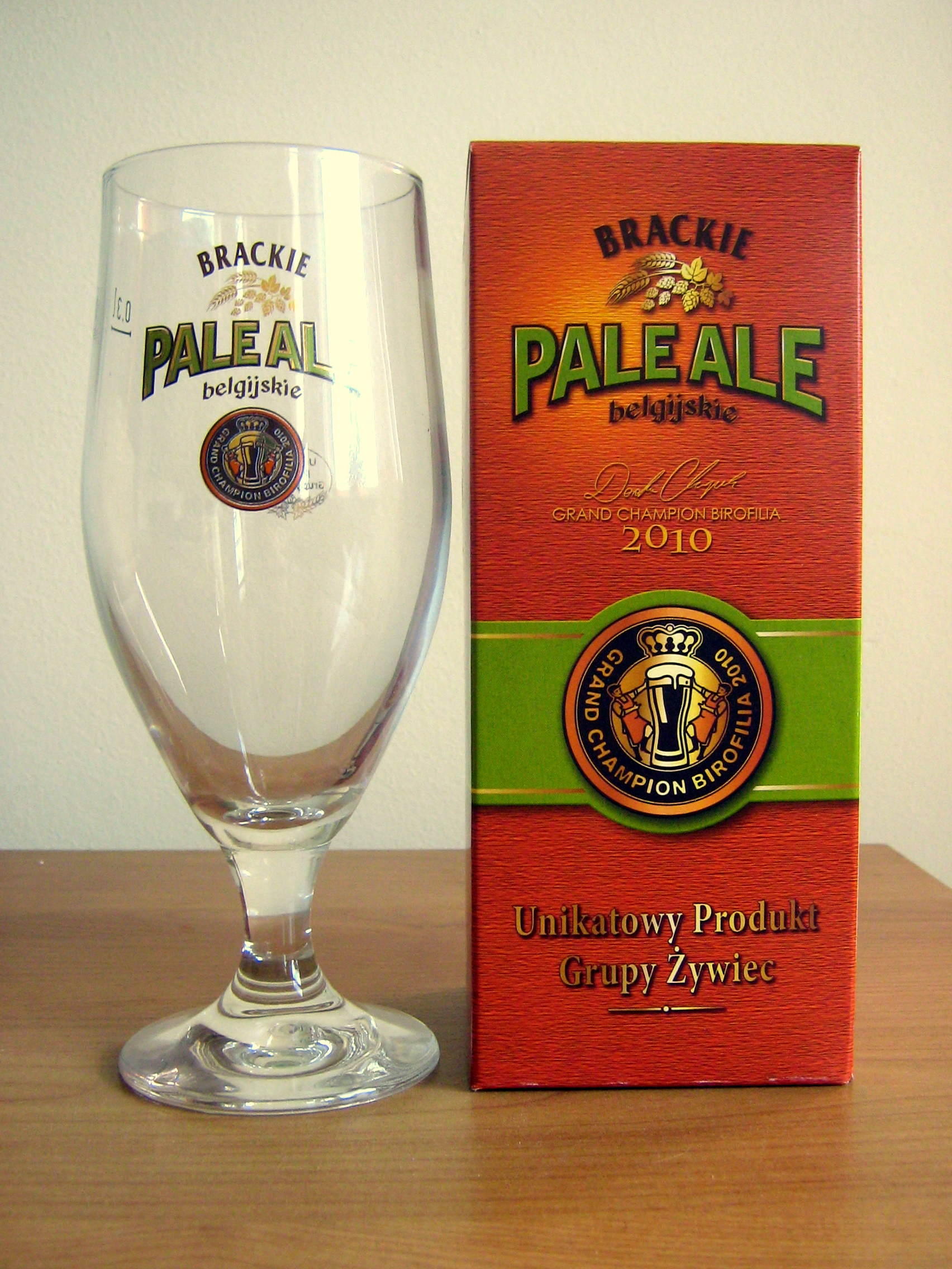 Kielich do Brackiego Pale Ale 2010 r.